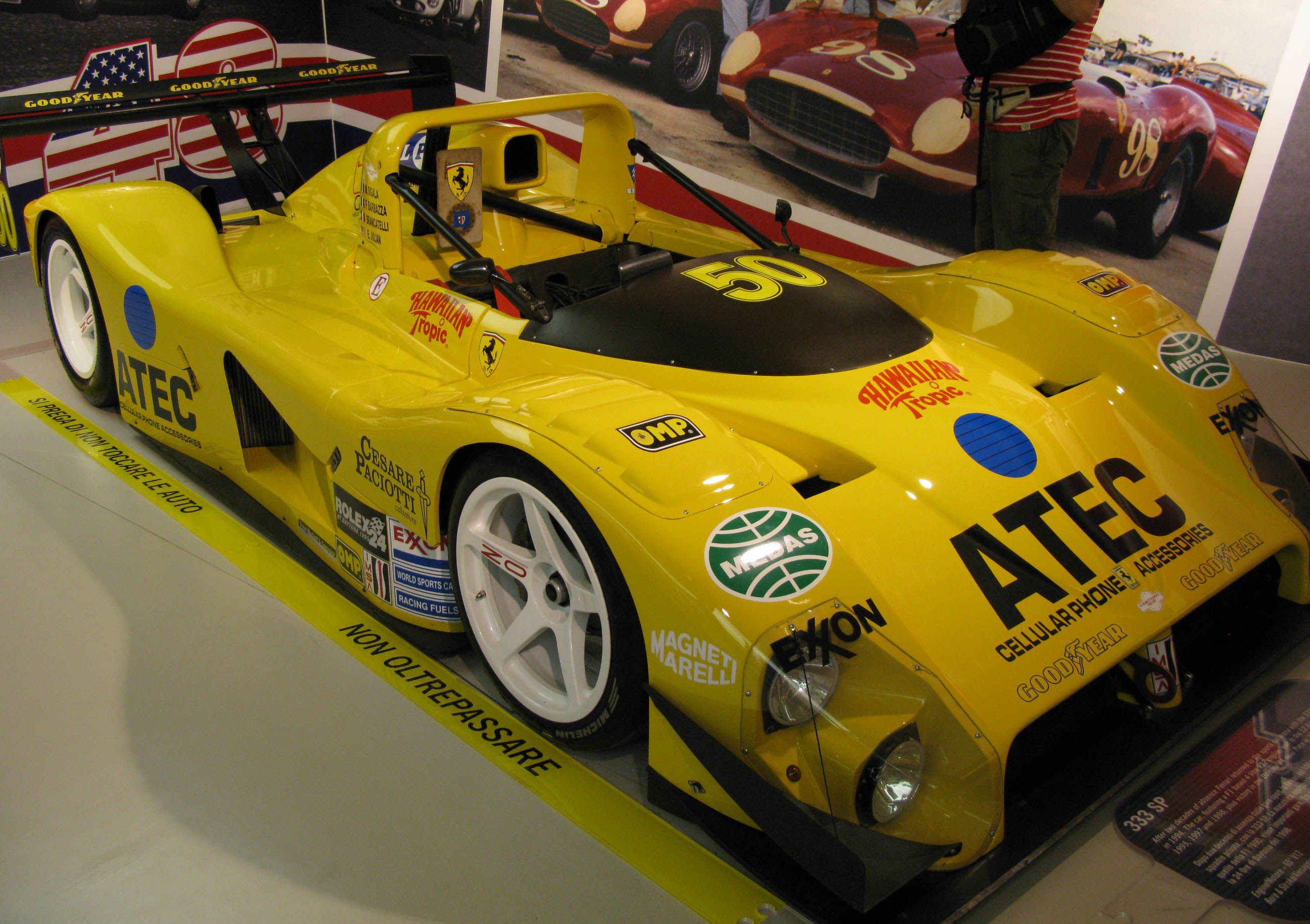 Ferrari 333 SP